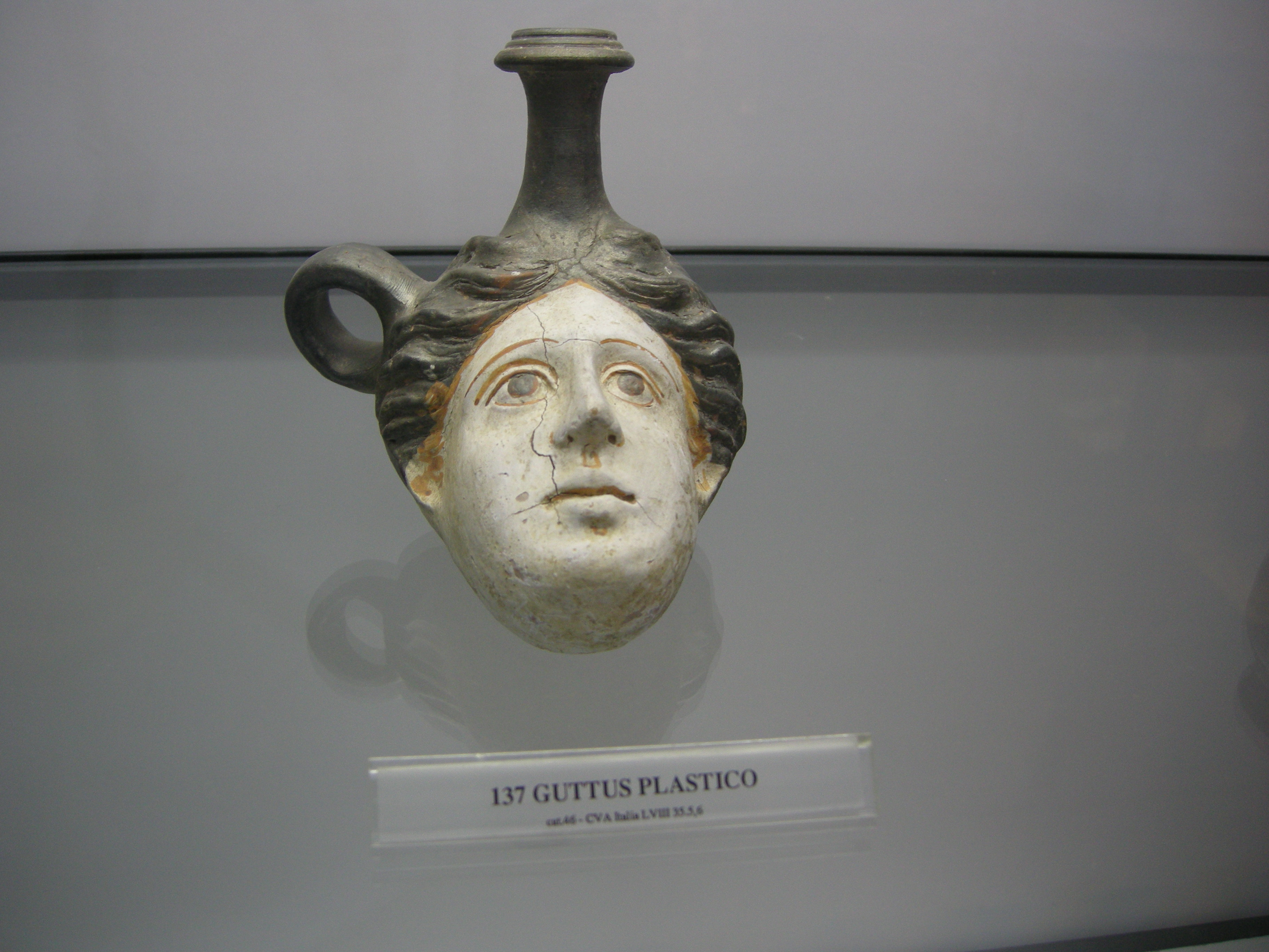 Ceramica, guttus plastico